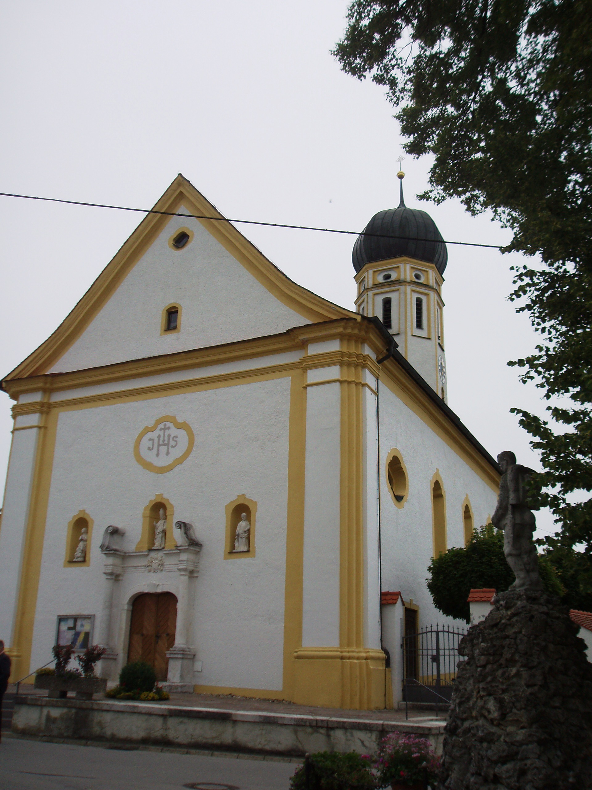 Mendorf_im_Landkreis_Eichstätt,_Westfassade_der_barocken_Pfarrkirche